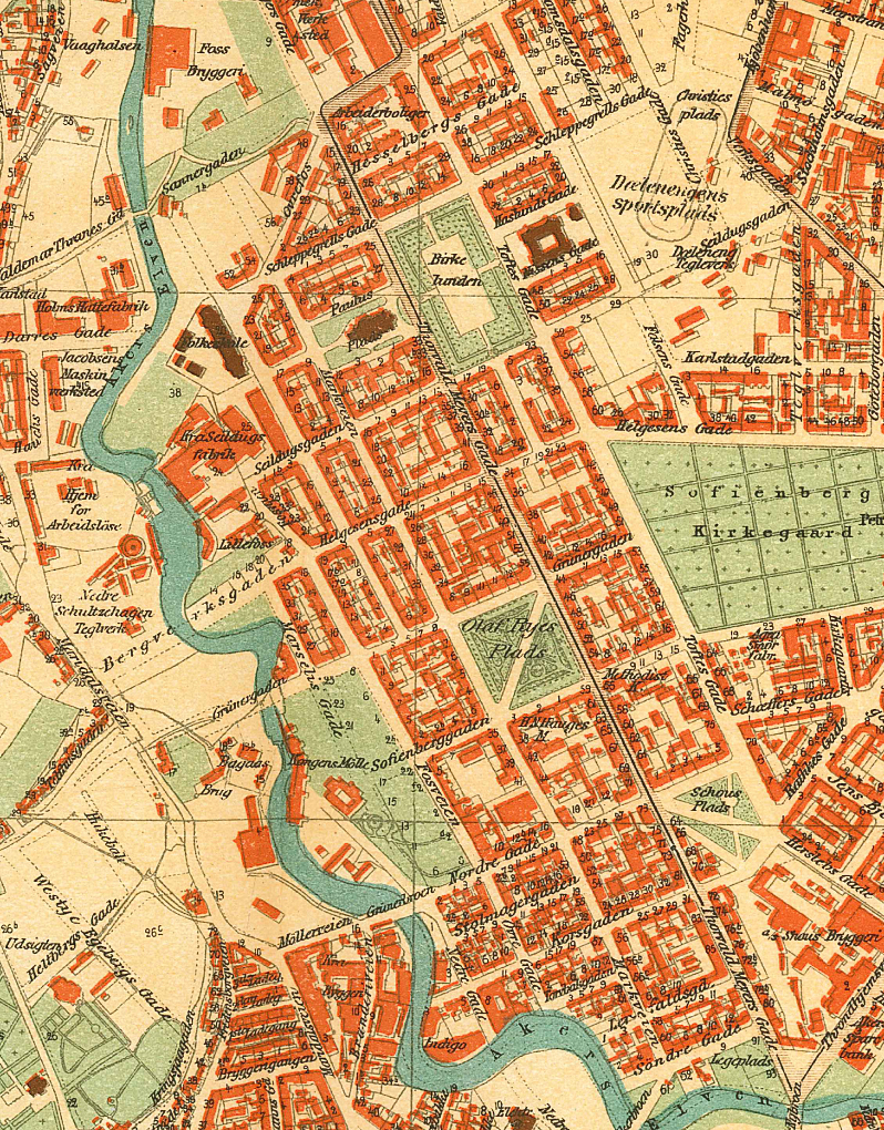 Kart over Grünerløkka.